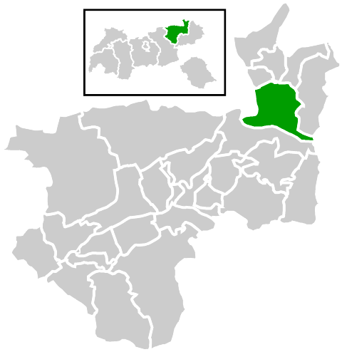 Lage der Gemeinde innerhalb des Bezirks Kufstein